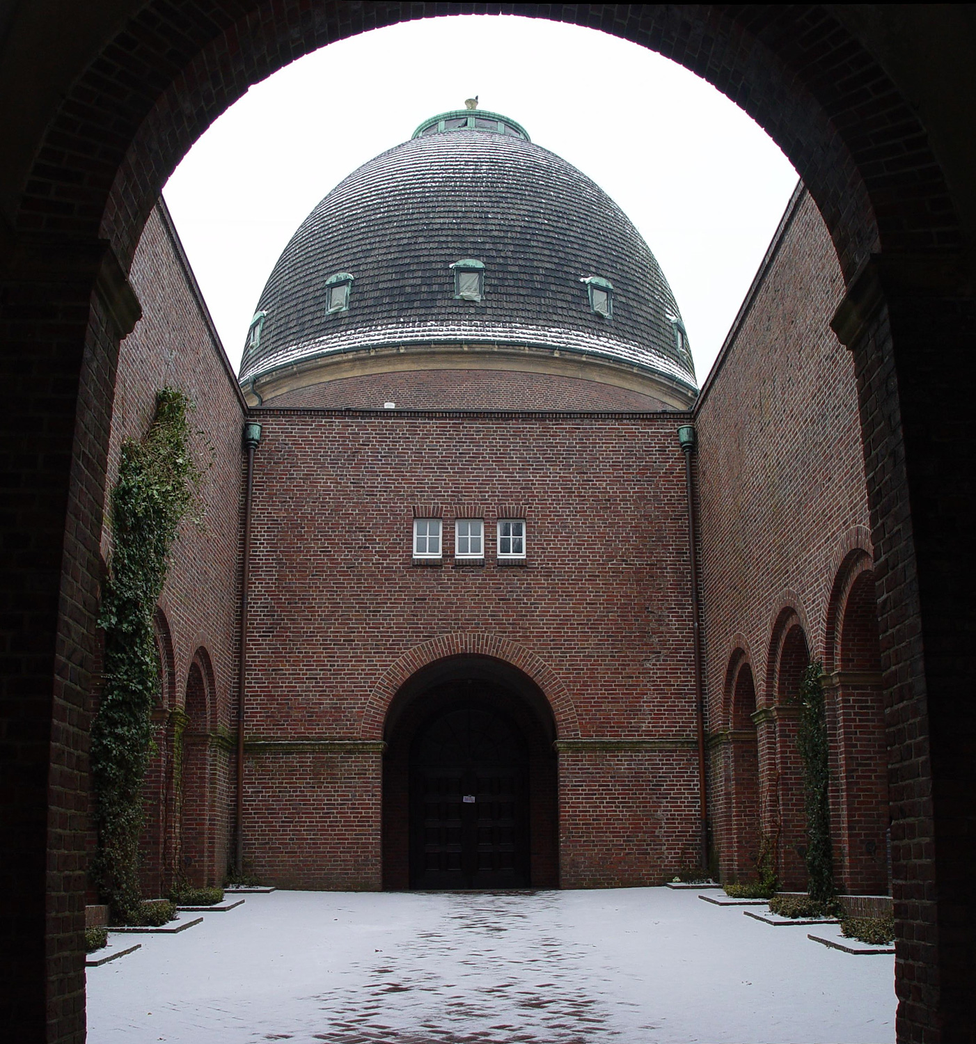 Kapelle des Osterholzer Friedhofs in Bremen. Rückseite